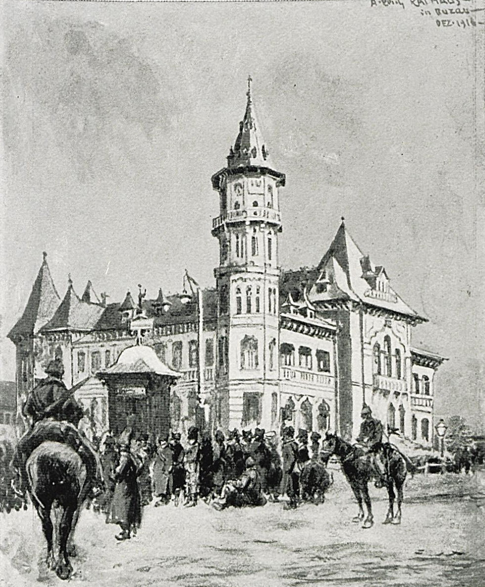 D - Buzau, palatul administrativ p55.jpg